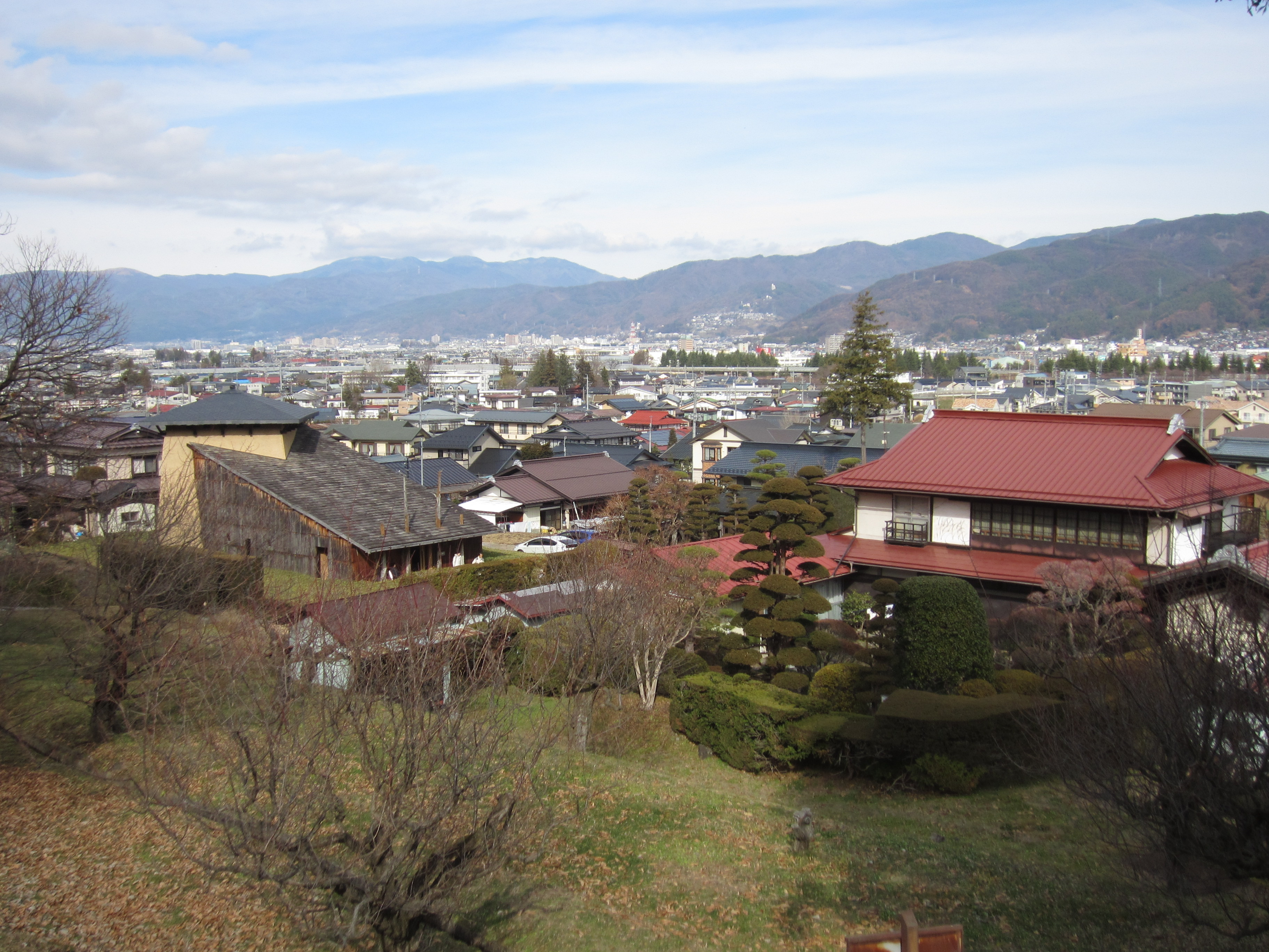 神長官守矢史料館 概観